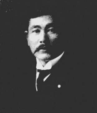 木内重四郎